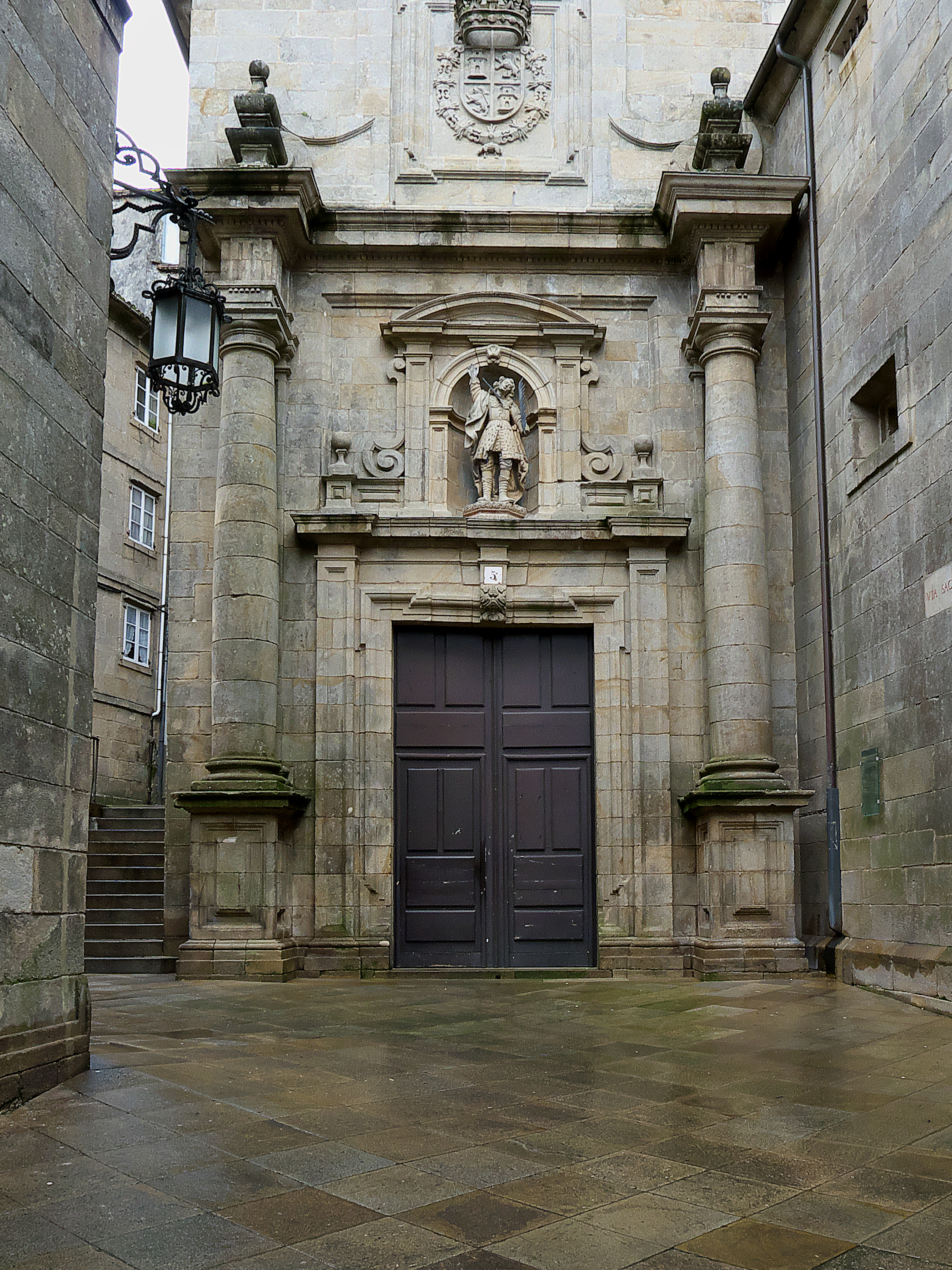 Una obra del benedictino fray Gabriel de las Casas (1707)